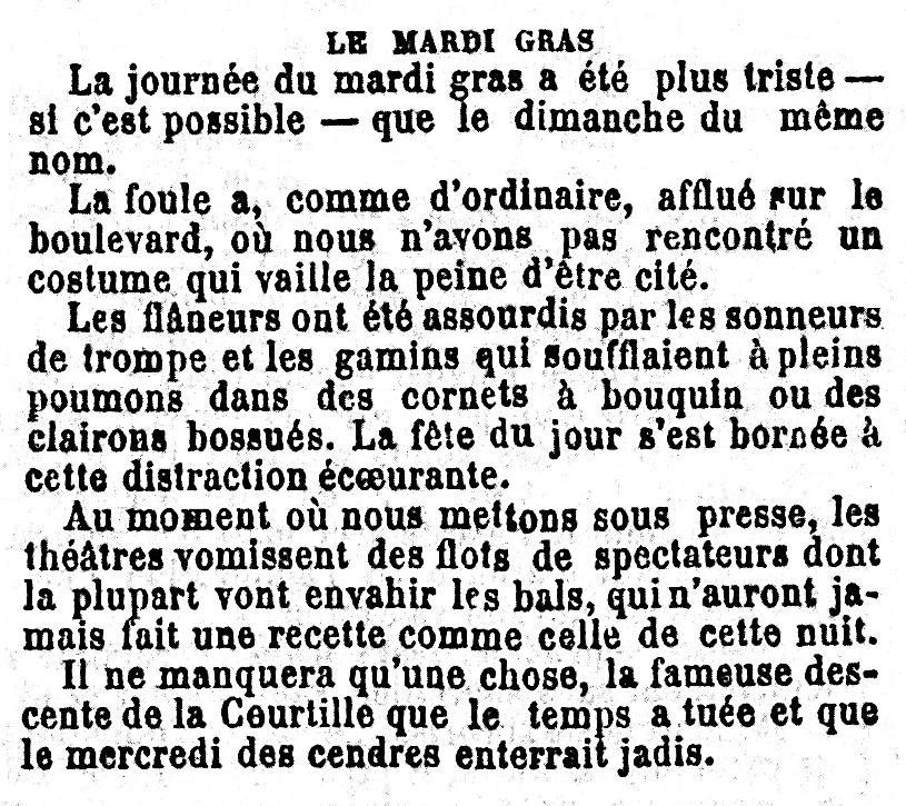 Un des trois articles sur le Carnaval de Paris paru dans ce journal le jeudi 11 février 1875. Page 3, 2ème colonne